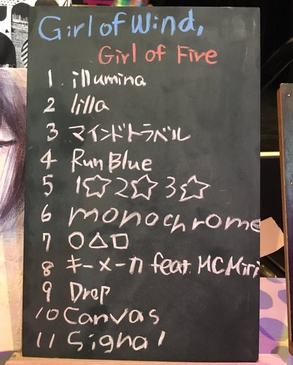 amiinaセトリボード(20160213(1-1))